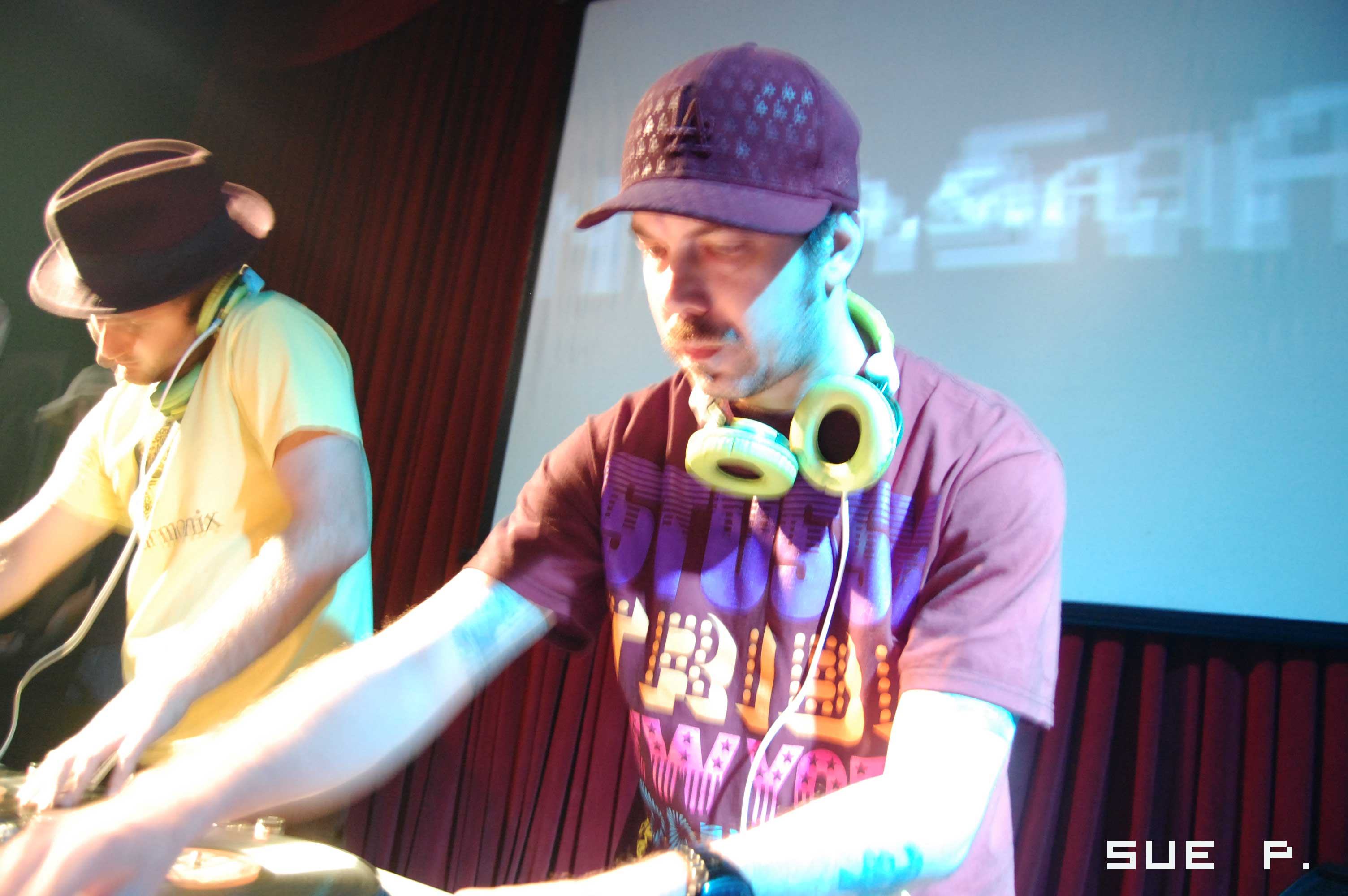 N.A.S.A. (DJ Zegon & Squeak E. Clean) São Paulo - Brasil 25-10-2007